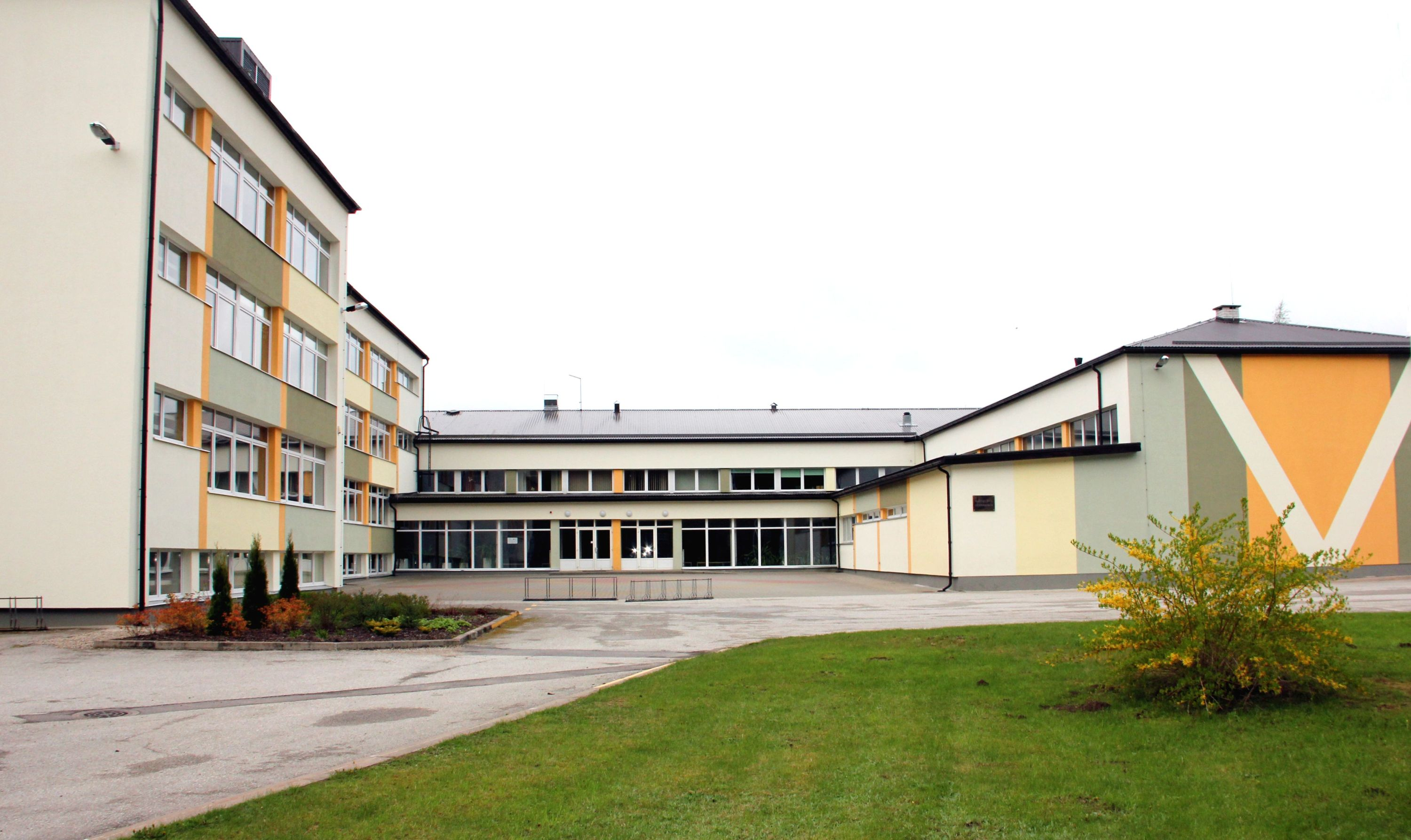 Vastseliina Gümnaasiumi eestvaade